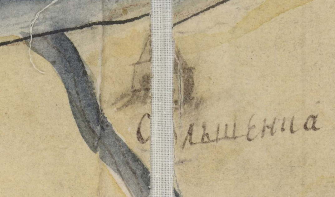 Фрагмент карти Київської губернії. XVIII століття. РГАДА, ф. 192, оп. 1, Киевская губ., № 5.